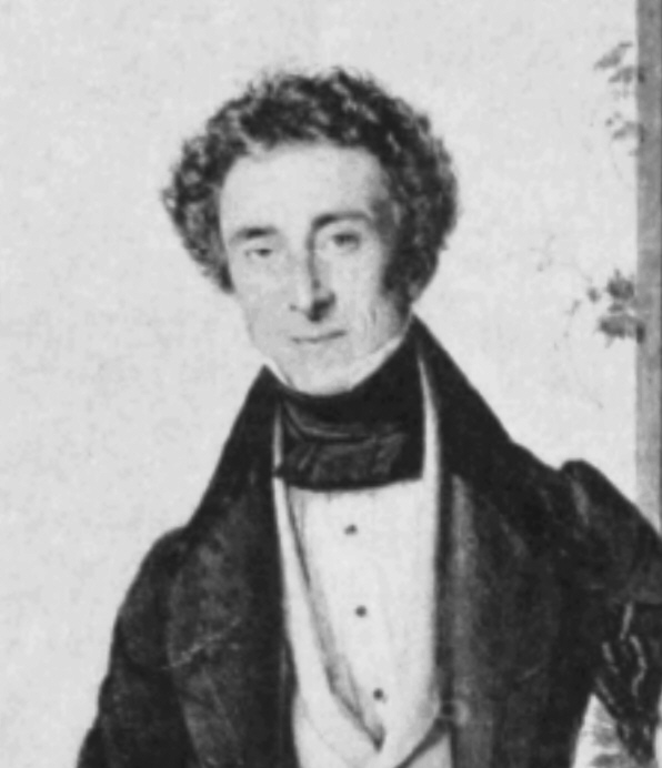 Portrait des Ludwig Aumont „Justus Carl Wilhelm Ruperti (1791-1861) und Familie“ Justus Carl Wilhelm Ruperti (* 29. Oktober 1791 in Stade; † 3. November 1861 in Hamburg)